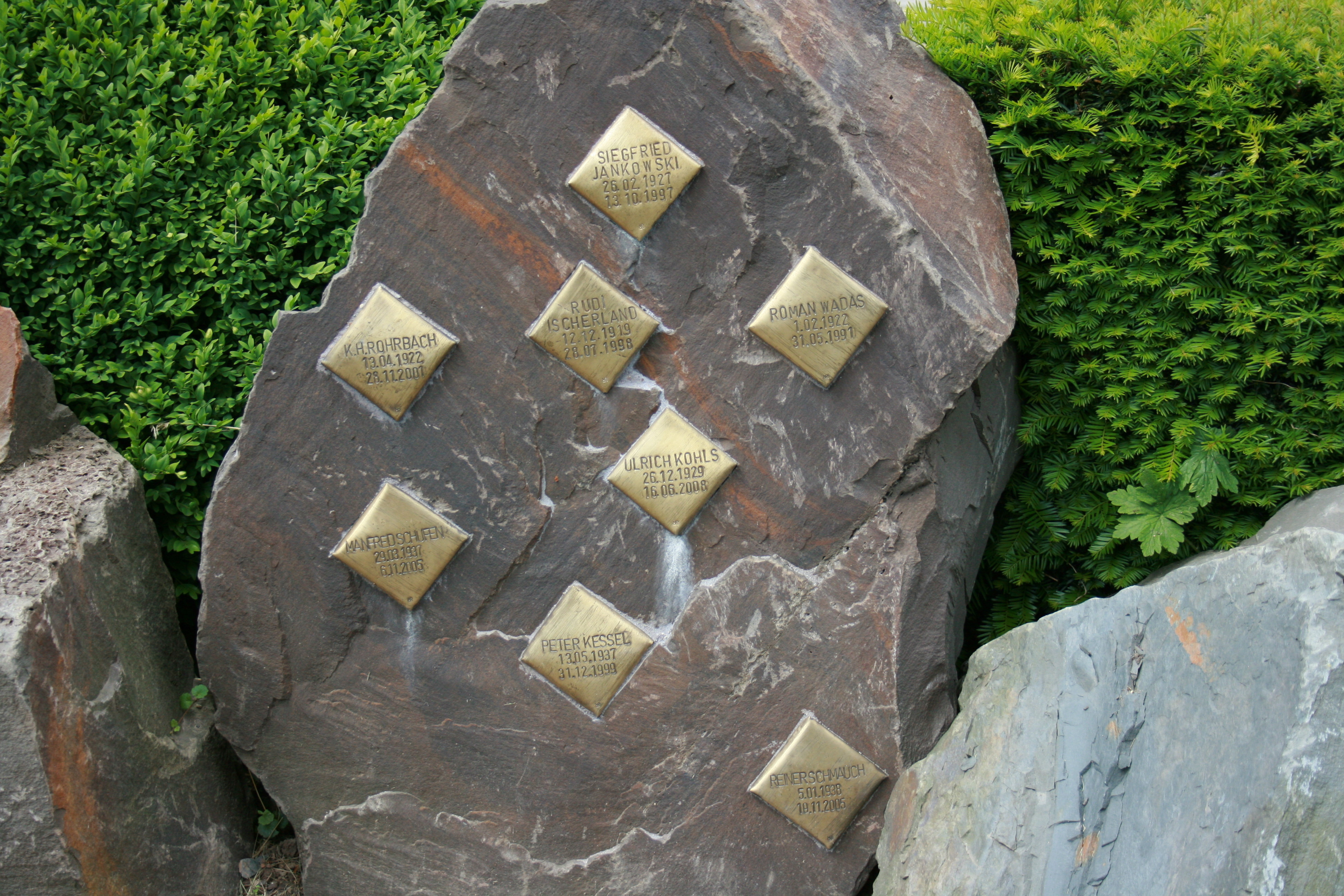 Schmunzelsteine am Friedrich-Ueberweg-Platz, Ecke Marktstraße / Mittelstraße in Leichlingen